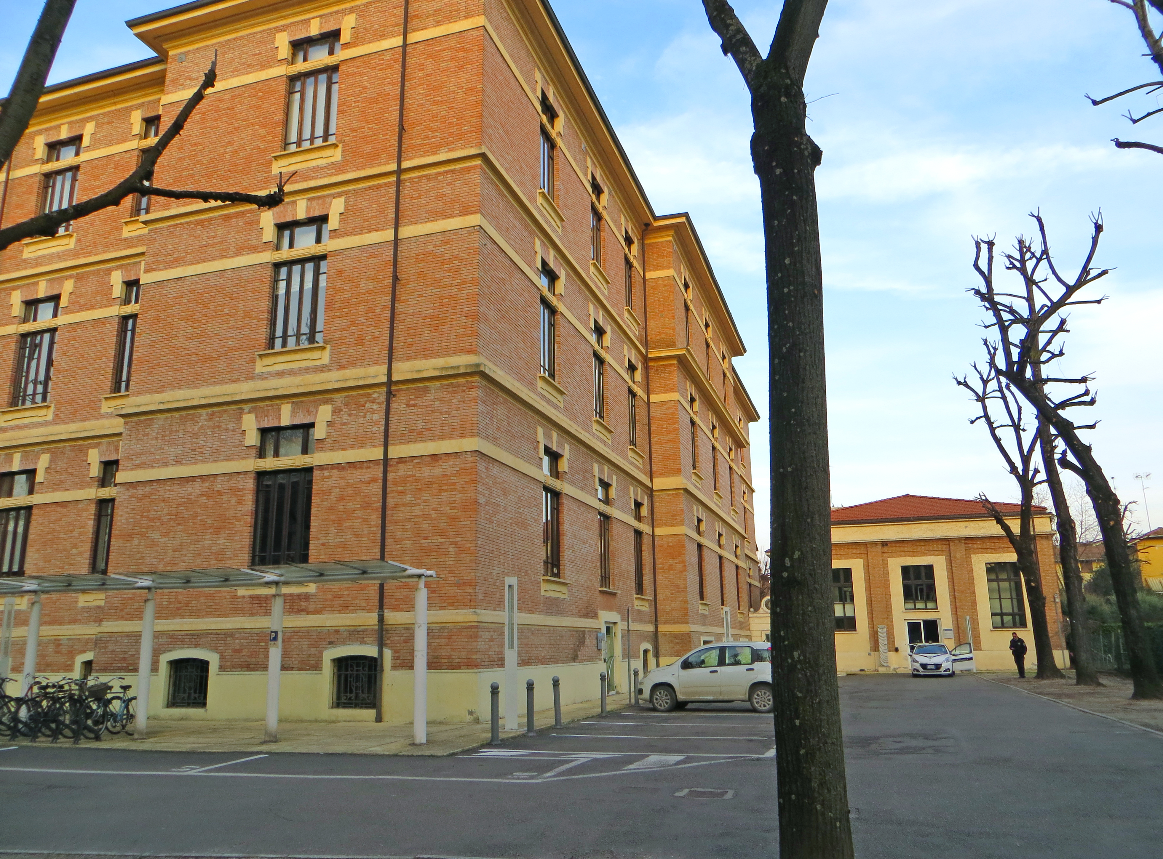 Palazzo Giordani (Parma) - retro ed ex palestra